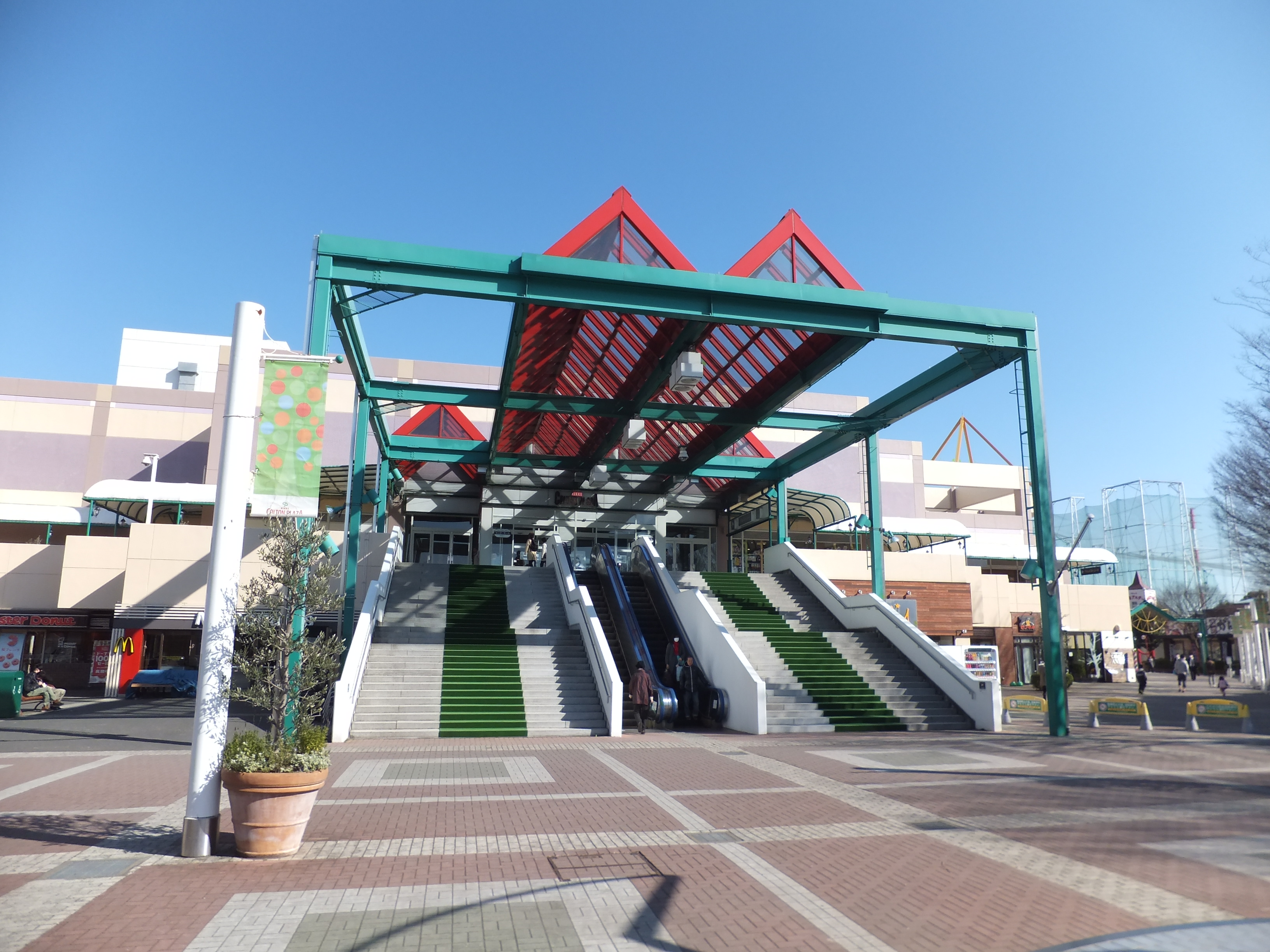 ニッケコルトンプラザ西入口